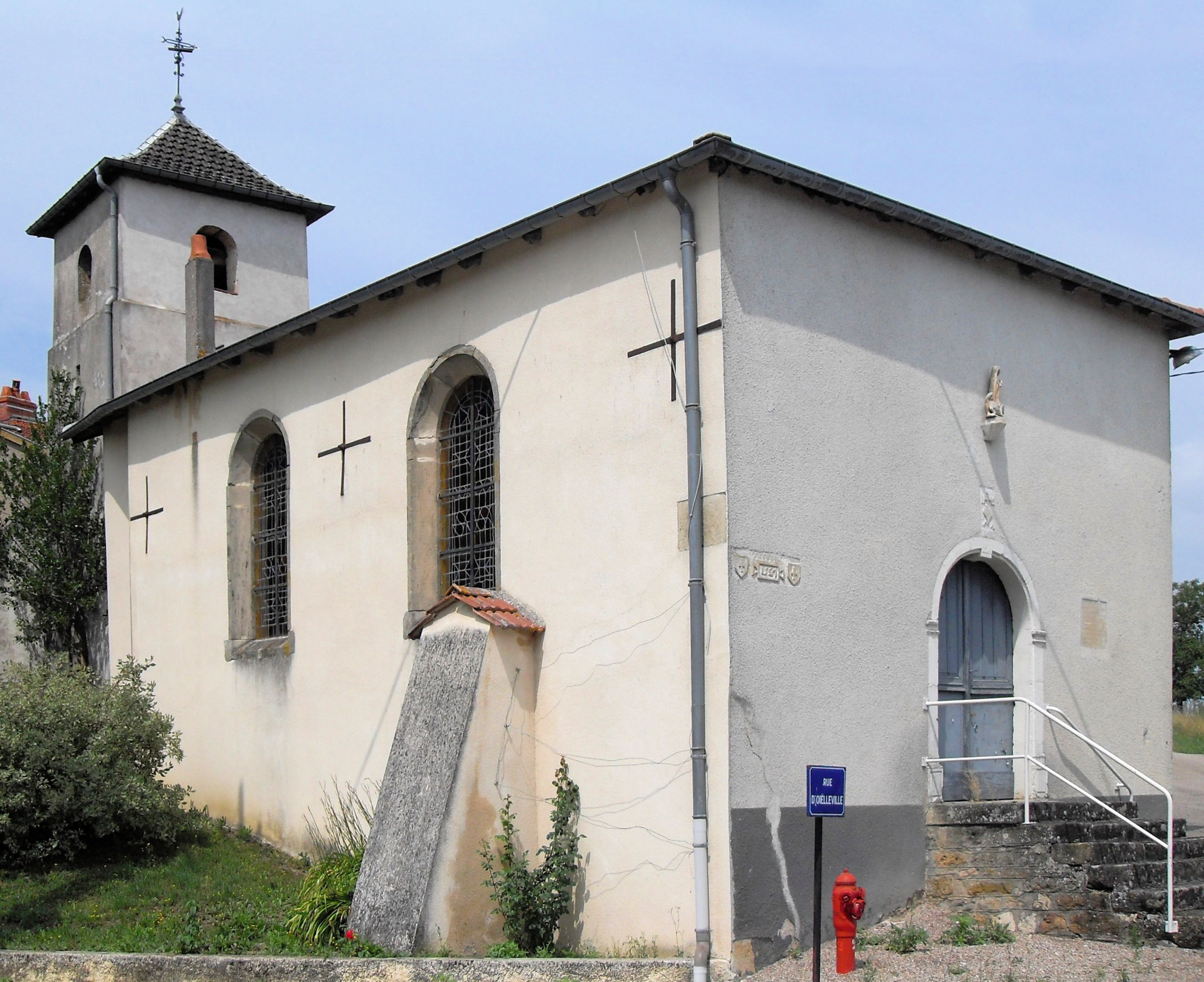 L'église Saint-Hubert à Blémerey, Département des Vosges